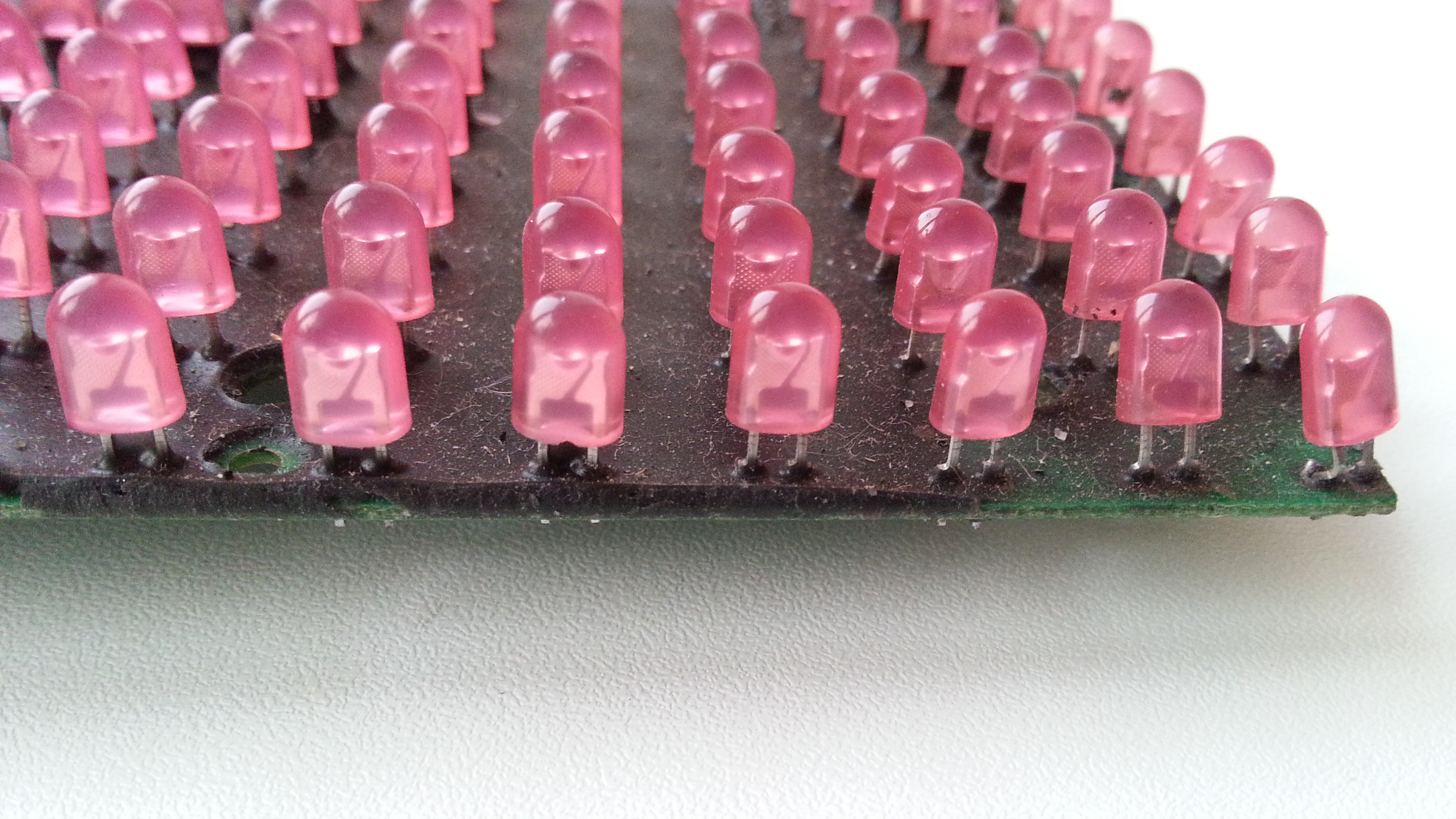 Пример не качественного модуля